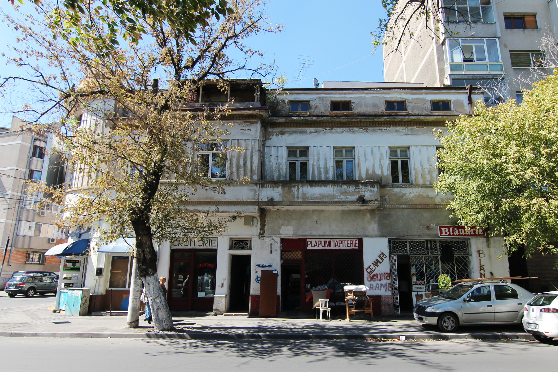 Imobil pe strada Traian